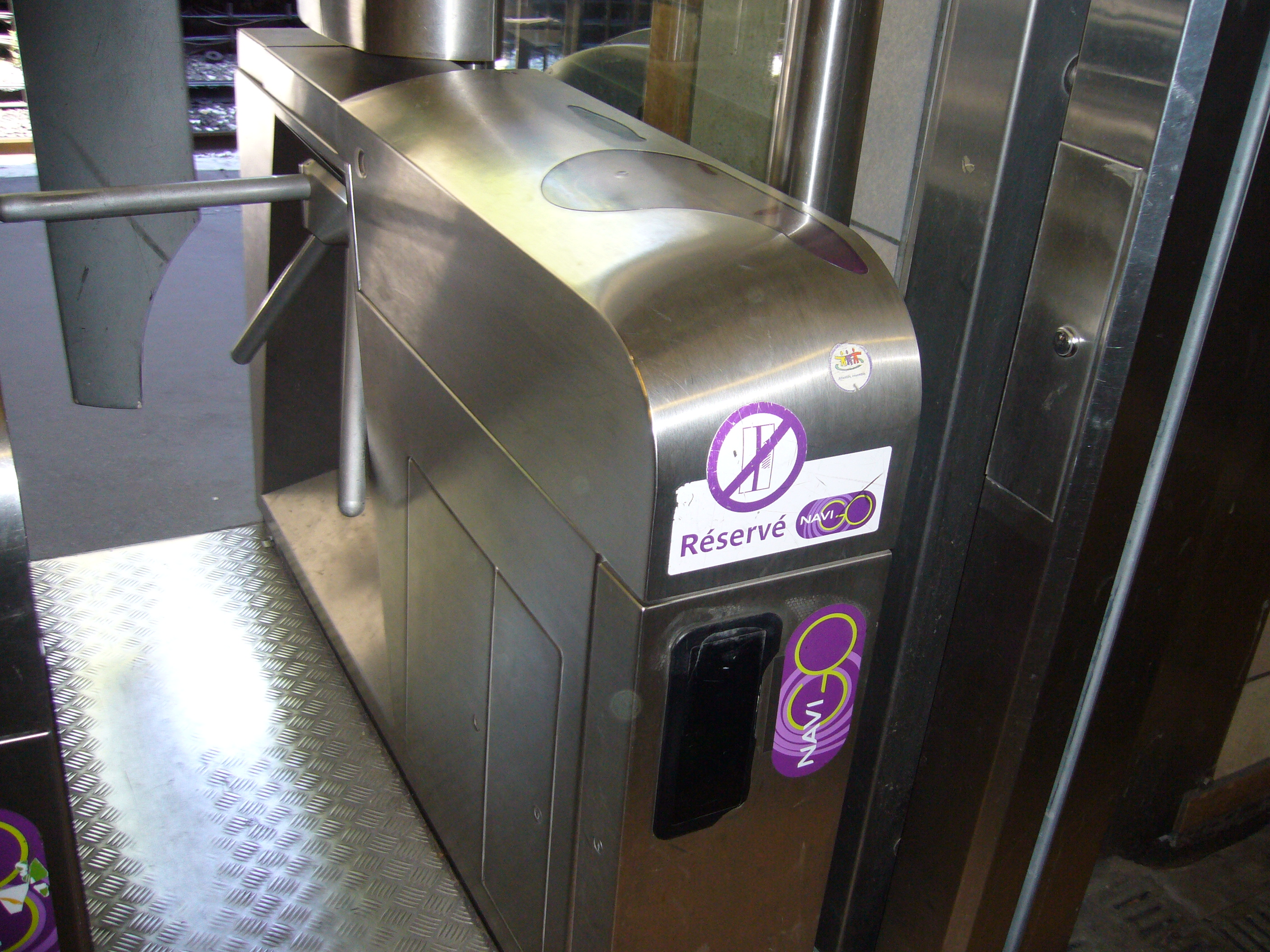 Validateur réservé aux passes Navigo à l'entrée des réseaux Métro et RER de Paris